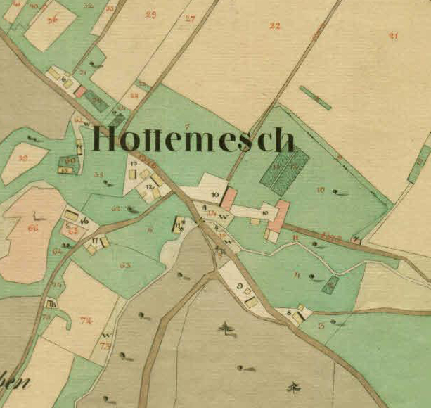 Franciscejski kataster za Kranjsko, 1823-1869